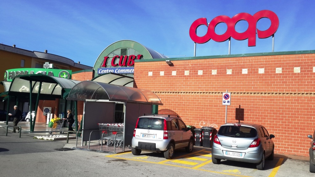 Il 10 aprile a Villa Reatina viene aperto un nuovo supermercato a insegna Coop. Si tratta del settantesimo punto vendita della Cooperativa.